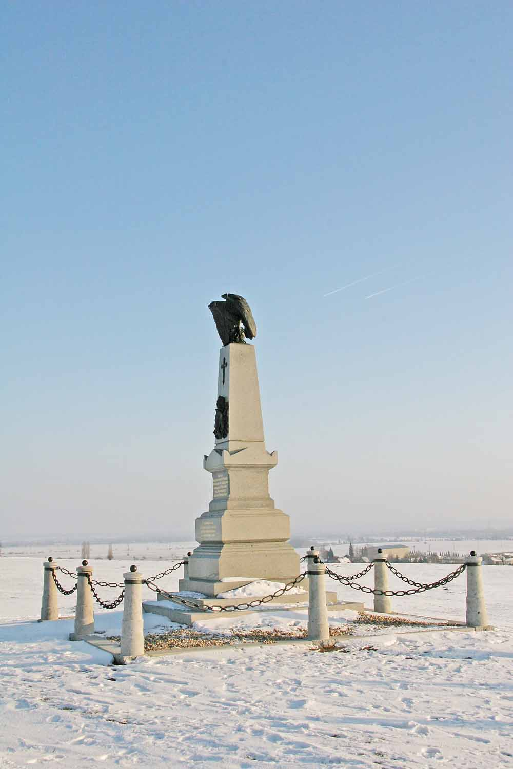 Pomník z Prusko-rakouské války roku 1866